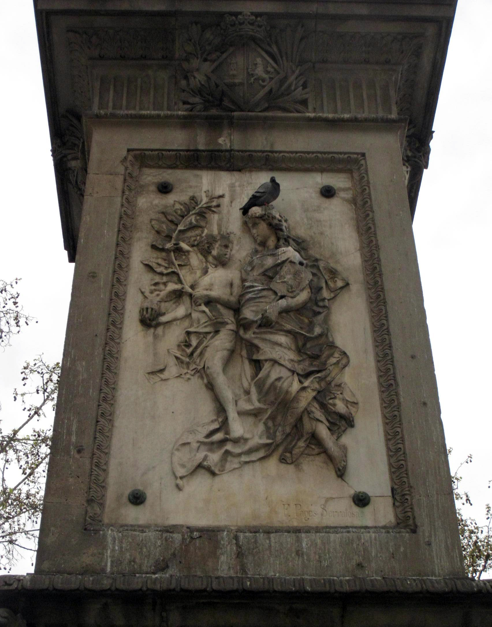 Compañía General de Tabacos de Filipinas relief by Francesc Pagès in A López i López monument. Pl. Antonio López (Barcelona)